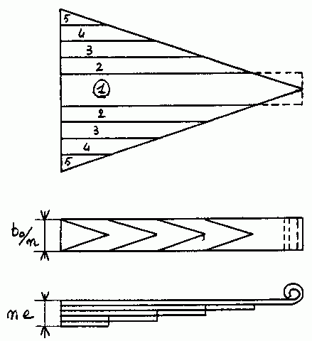 découpage en lames - dessin de Jean-Jacques MILAN , reproduction libre